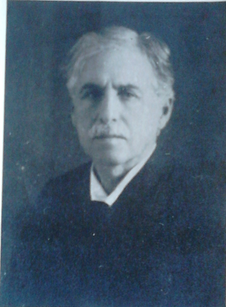 Натан Амерханц - Князев (30.03.1872 - 04.10.1949)